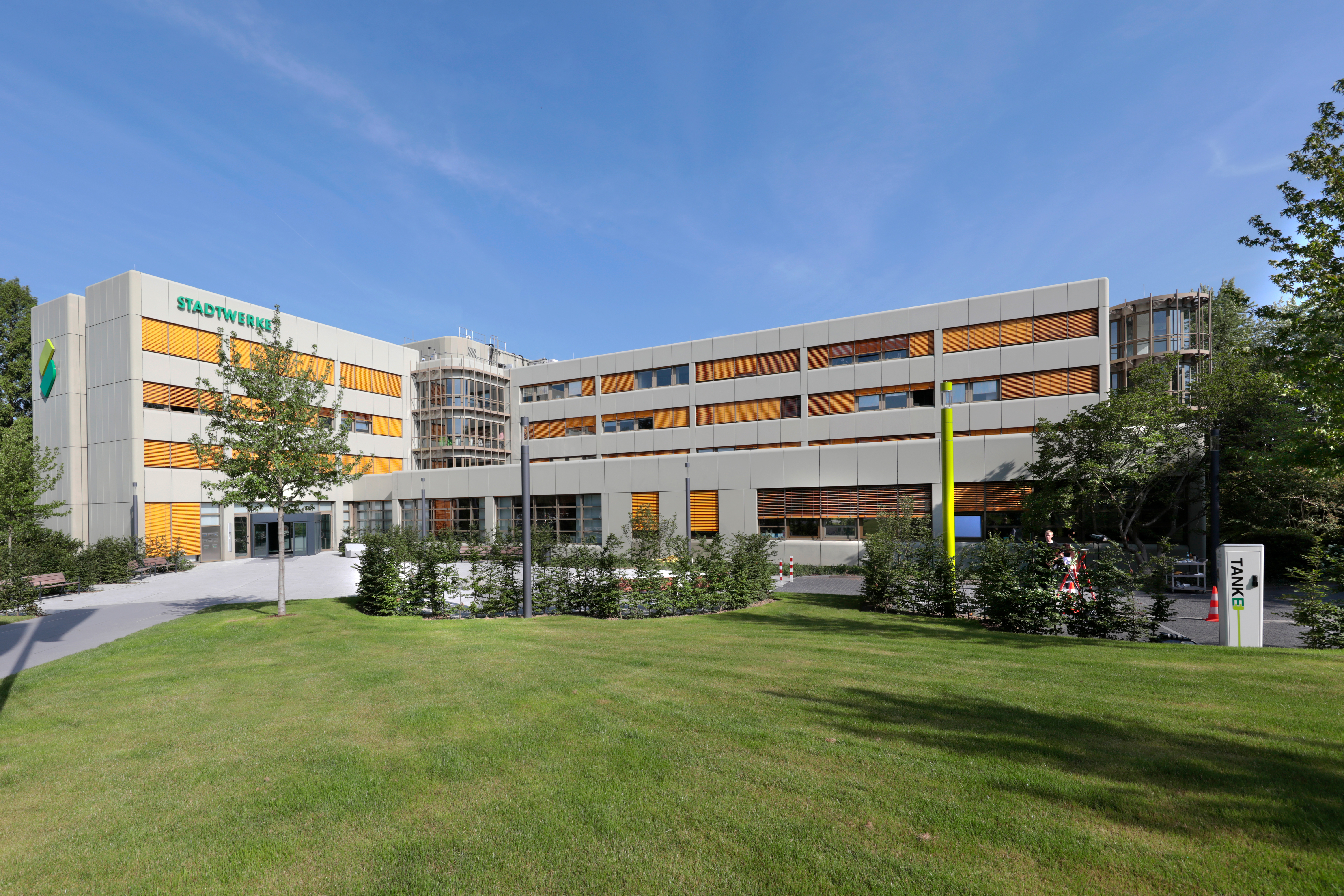 Stadtwerke Solingen, Hauptgebäude, Beethovenstraße 210, 42655 Solingen, Ansicht von Beethovenstraße inkl. Vorplatz, Juni 2018